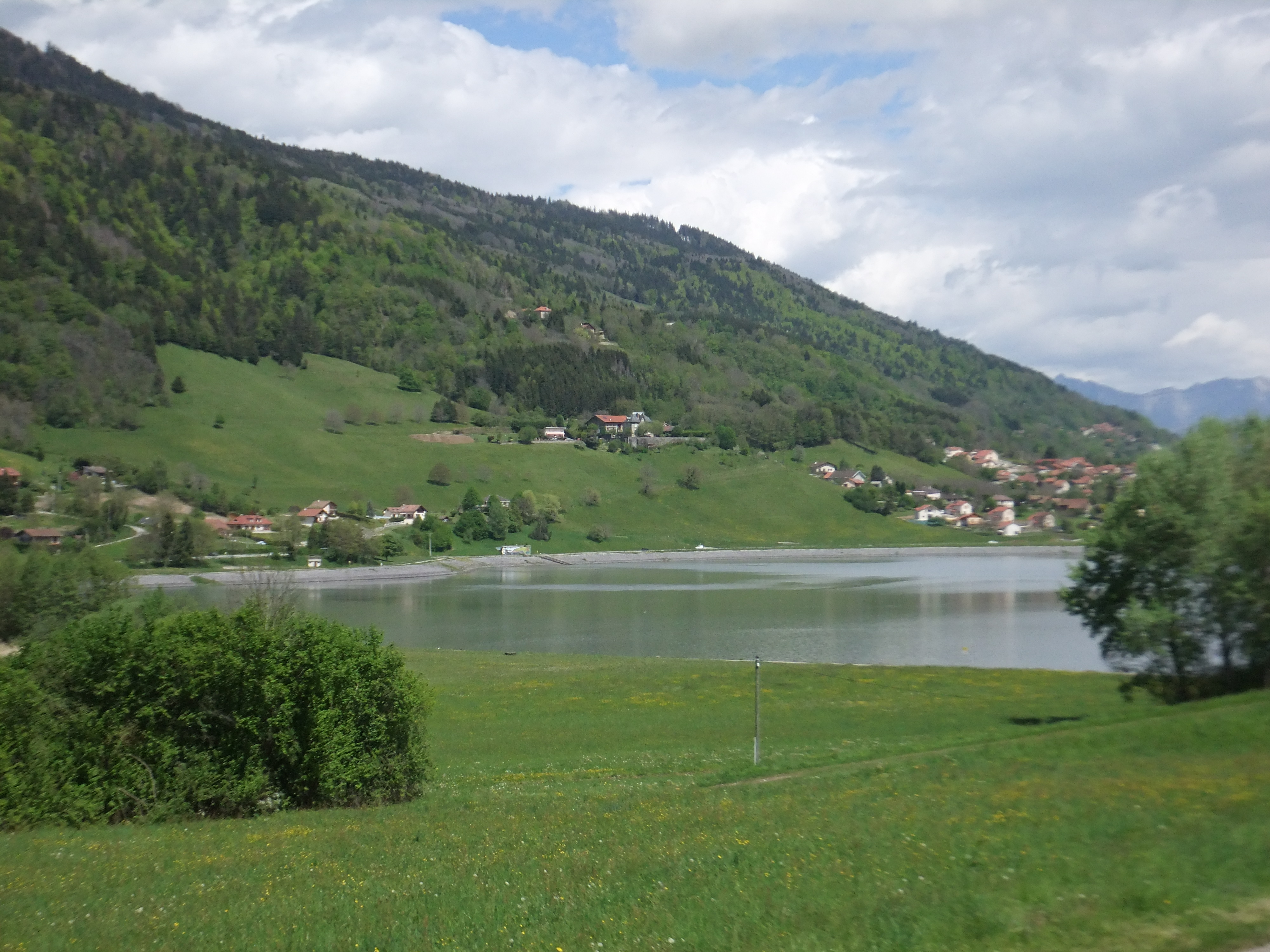 Bassin d'éclusée le long de la conduite EDF Arc-Isère alimentant la centrale hydro-électrique du Cheylas, servant au stockage des eaux arrivant par gravité ou remontées par pompage, construit à l'emplacement d'un ancien marais. Il est vu de Saint-Pierre en direction d'Allevard, avec les maisons des hameaux de La Rochen Le Chaboux, Les Maladières, s'étageant sur l'adret de Bramefarine.